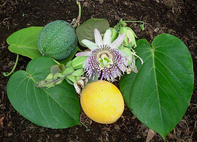 Pasionaria S. (c)